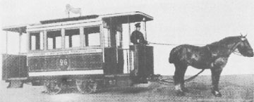 Bildbeschreibung: Pferdebahn der Aachener und Burtscheider Pferde-Eisenbahn-Gesellschaft Quelle: Archiv ASEAG Fotograf/Zeichner: unbekannt Datum: um 1890 Sonstiges: Repro presse03